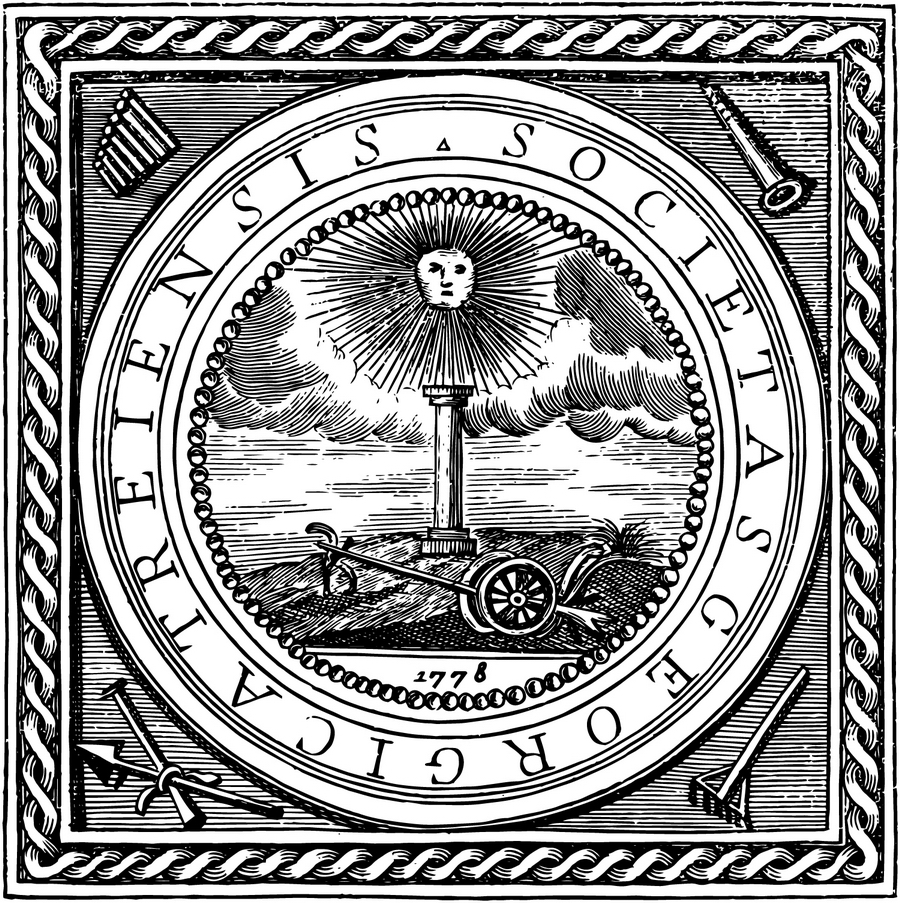 Accademia Georgica